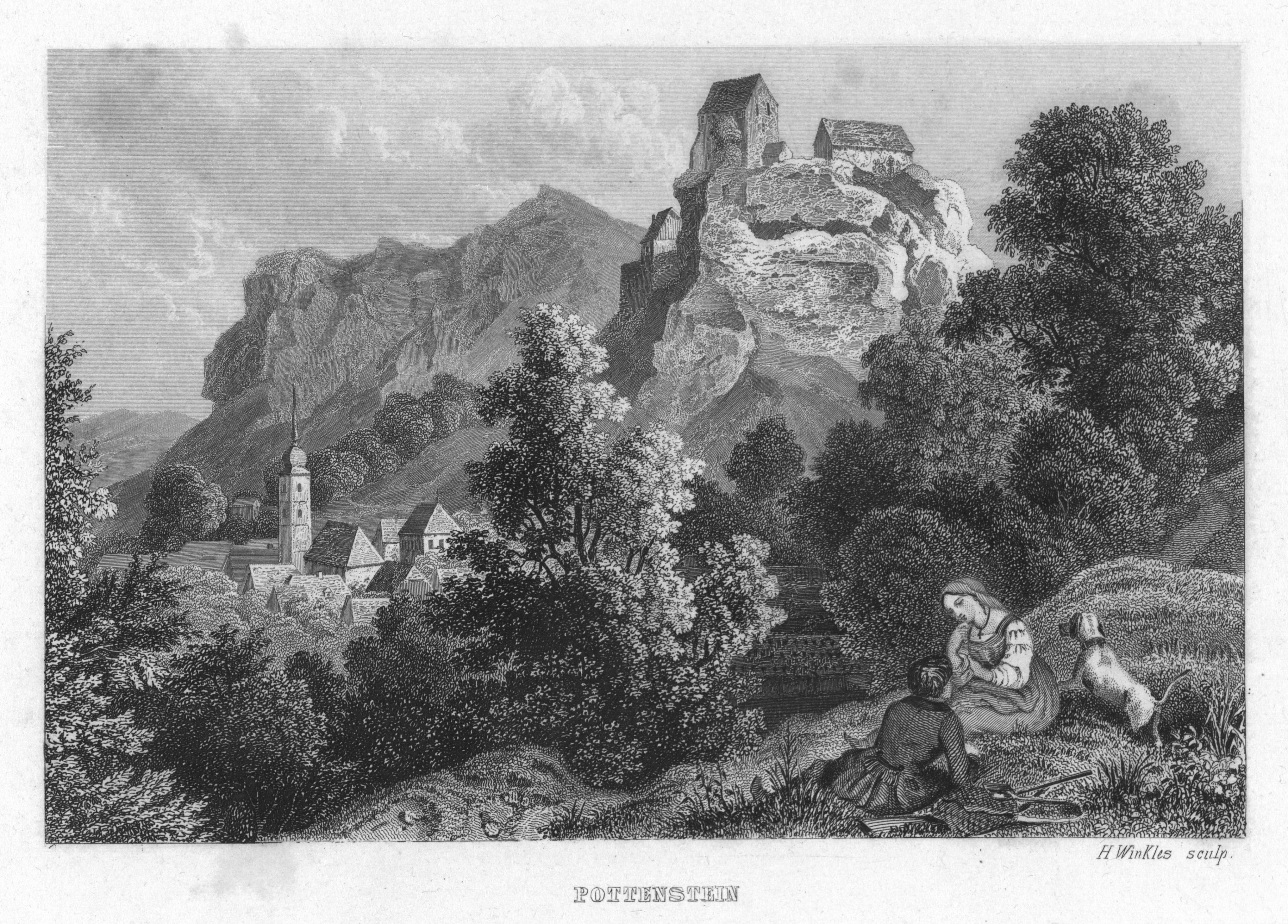 Pottenstein in Album der fränkischen Schweiz. Neun Stahlstiche. 1840.